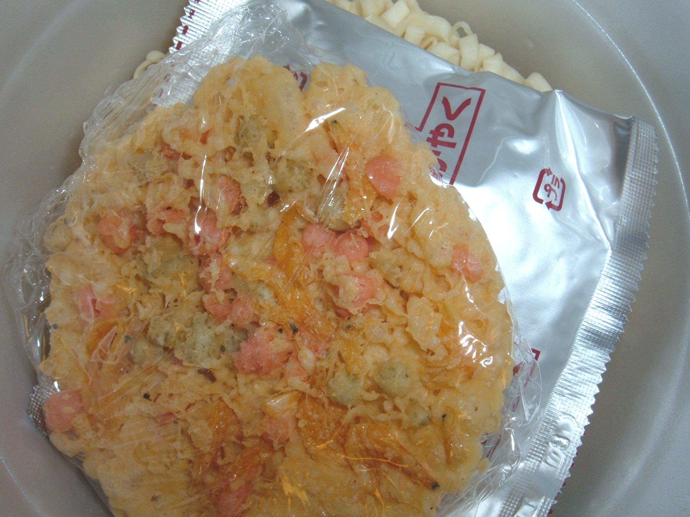 Instant sanuke tempura udon - tempura and soup packaging